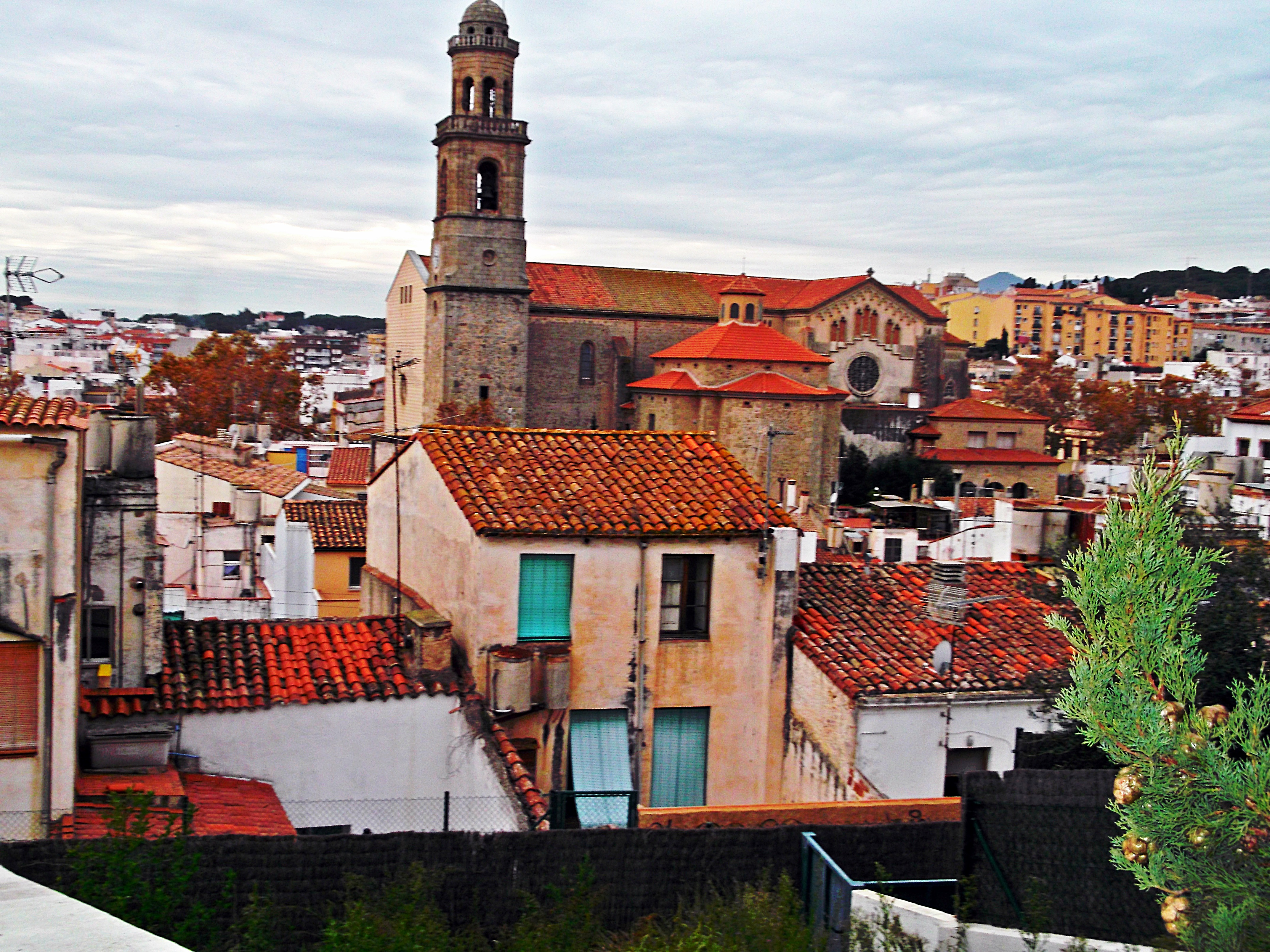 L'esglèsia de perfil.